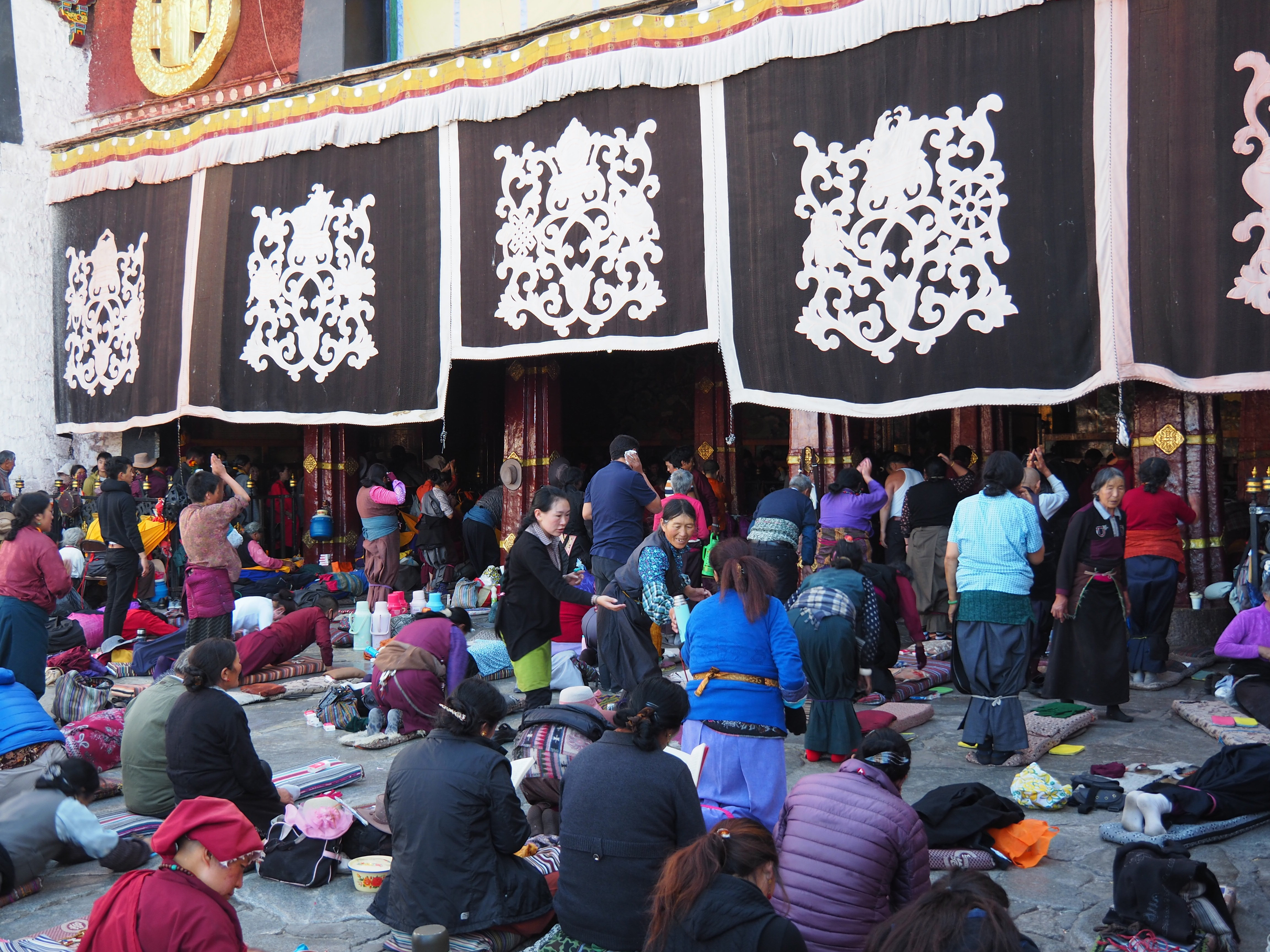 Jokhang Temple